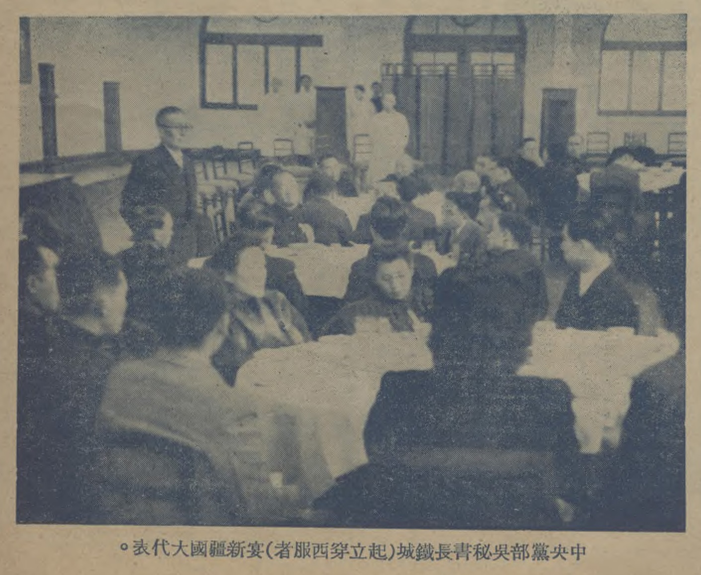 中文（中国大陆）: 新疆省國民大會代表於制憲國民大會在全國遊歷 中國國民黨中央黨部秘書長吳鐵城(起立穿西服者)宴請新疆省國民大會代表